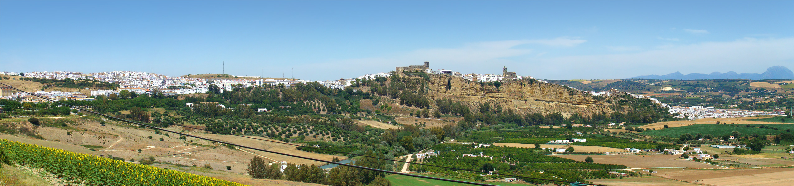 Arcos de la Frontera, Andalucía, España.